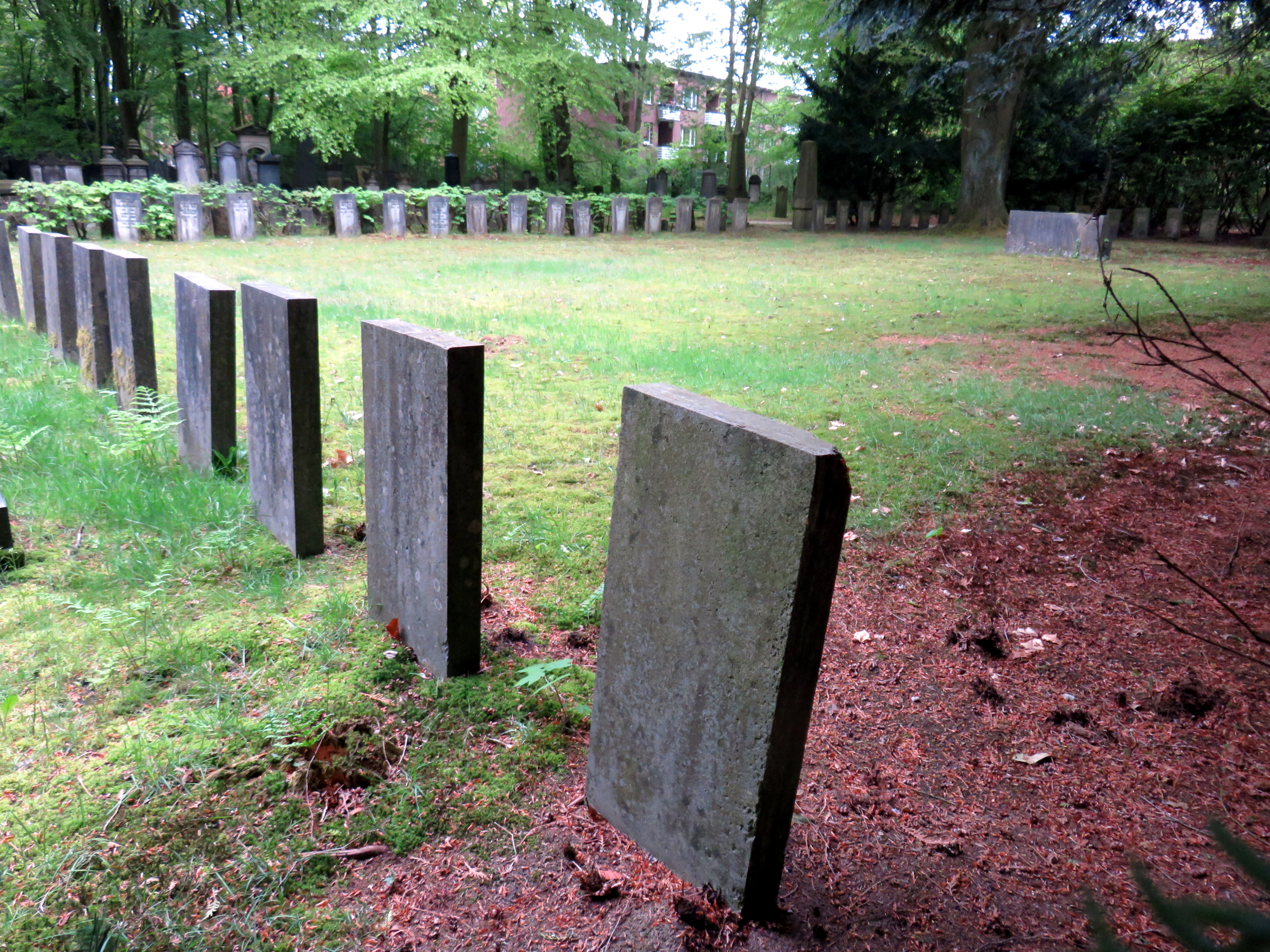 Ehrenanlage mit einheitlichen Gedenksteinen für Prominente des ehemaligen Jüdischen Friedhofs am Grindel, nach dessen Auflösung 1937 vom deutschen Architekten Fritz Block entworfen.